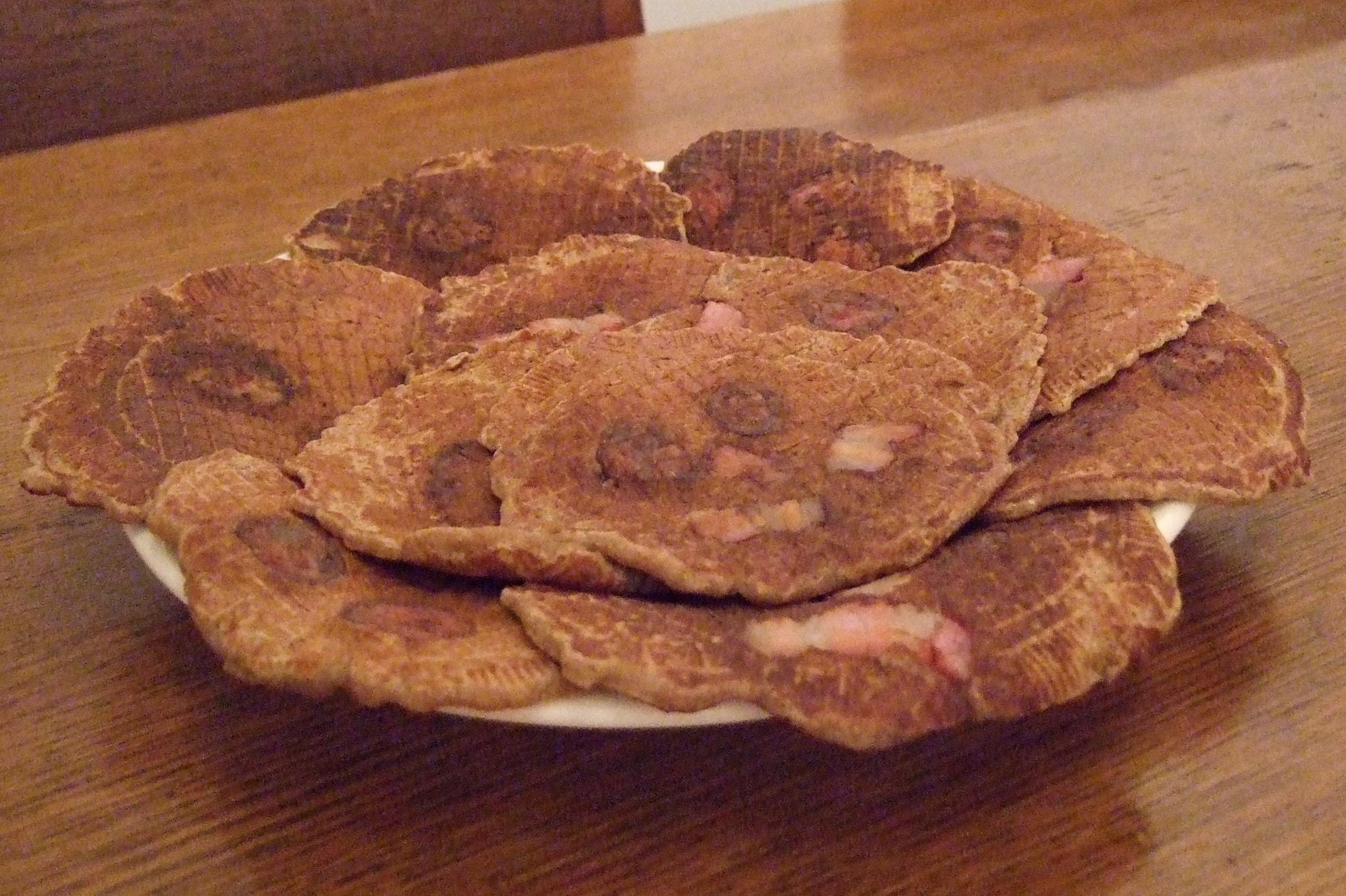 Spekdikken Categorie:Afbeelding gebak